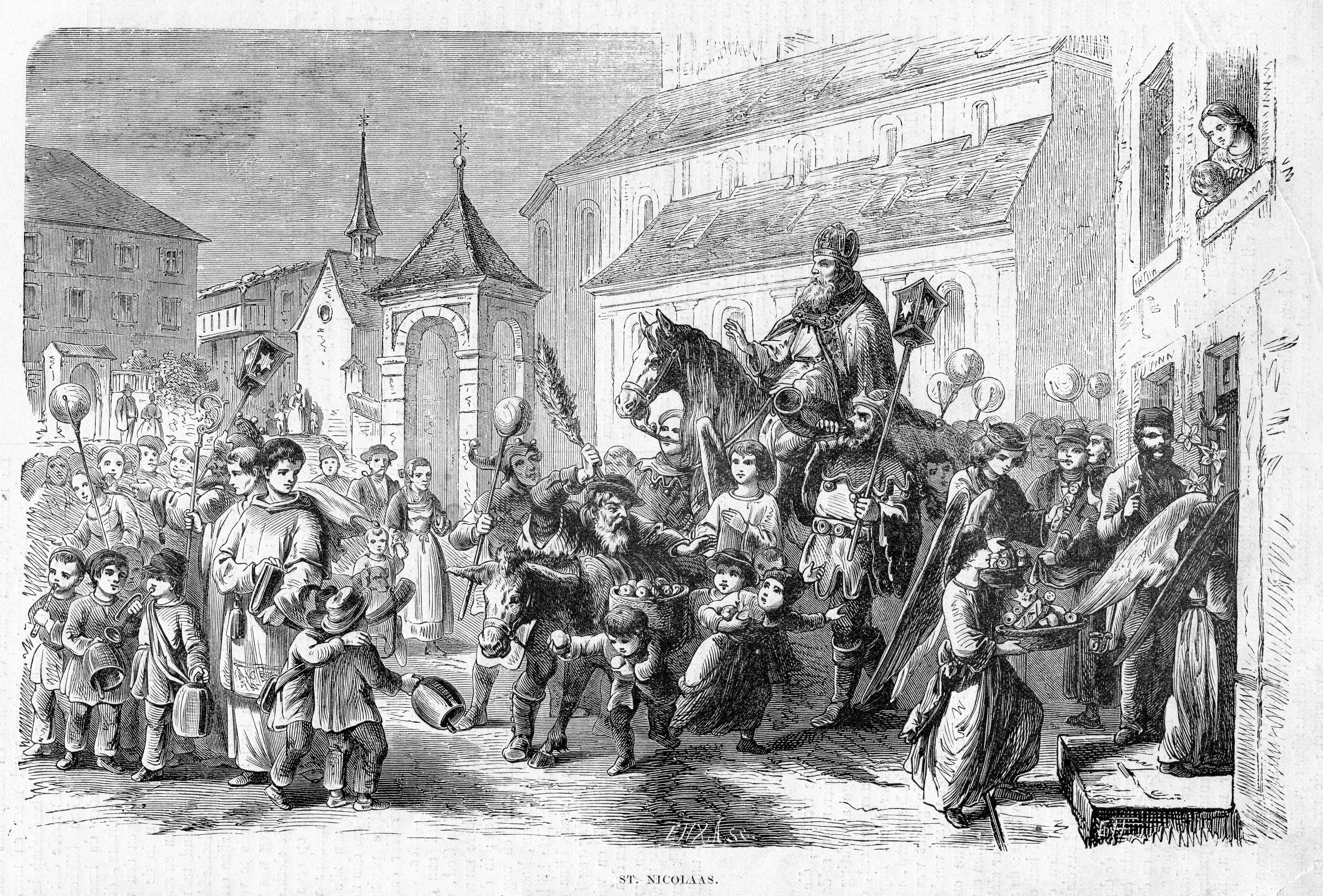 Kath. Illustratie 1869-1870 nr 15 p.116 gravure St. Nicolaas